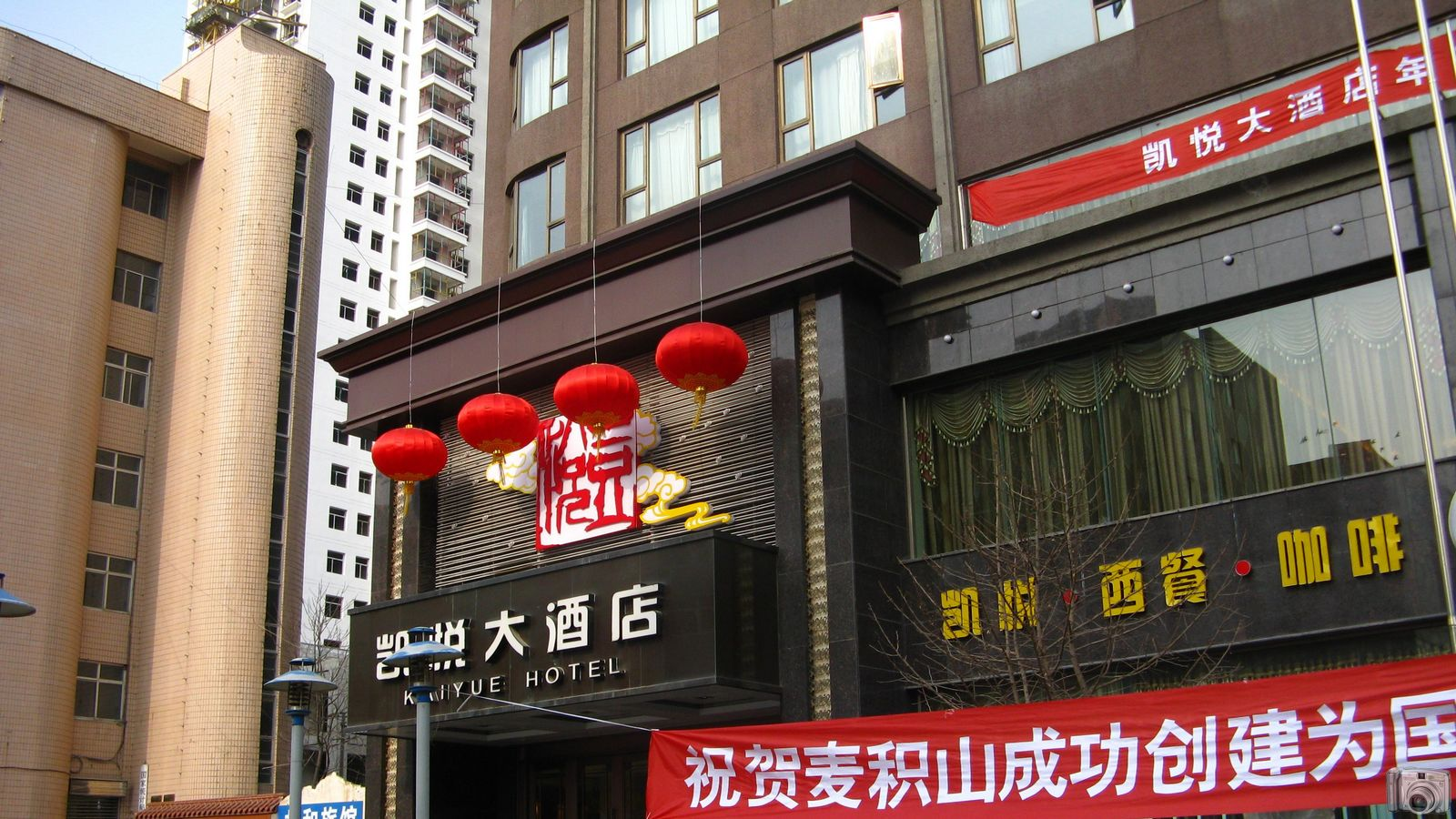 凯越大酒店